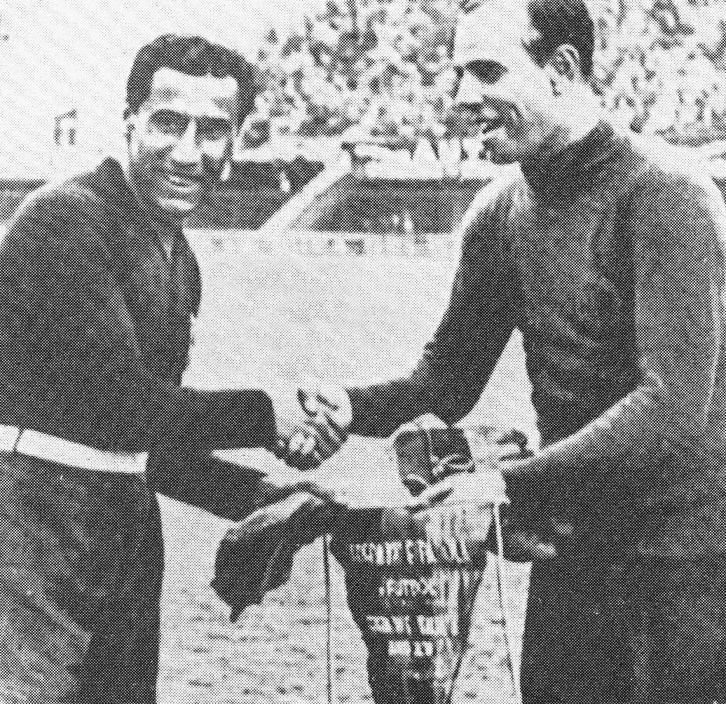 Firenze, stadio Giovanni Berta, 31 maggio 1934. I due portieri e capitani delle nazionali di Italia e Spagna, rispettivamente Gianpiero Combi (a sinistra) e Ricardo Zamora (a destra), nel rituale scambio di gagliardetti prima del fischio d'inizio della sfida (1-1 d.t.s.) valevole per i quarti di finale del campionato mondiale di calcio 1934; il giorno dopo, l'Italia vincerà (1-0) la ripetizione.